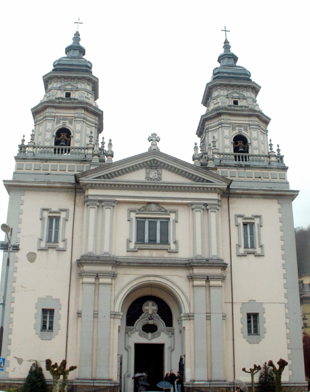 Iglesia de San Juan Bautista, Mieres (Asturias)